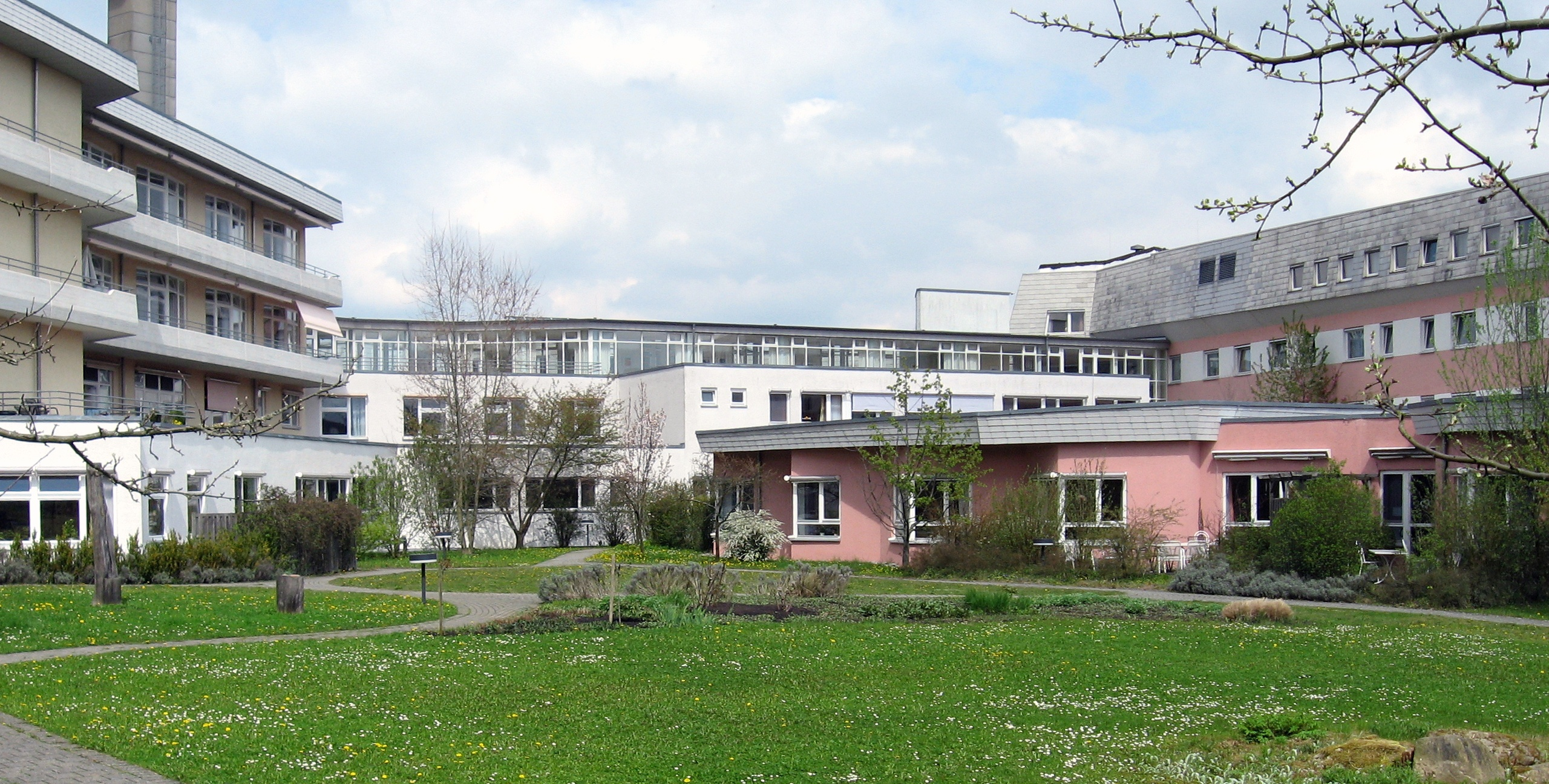 Filderklinik